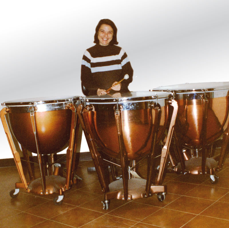 Clara Perra metodologia